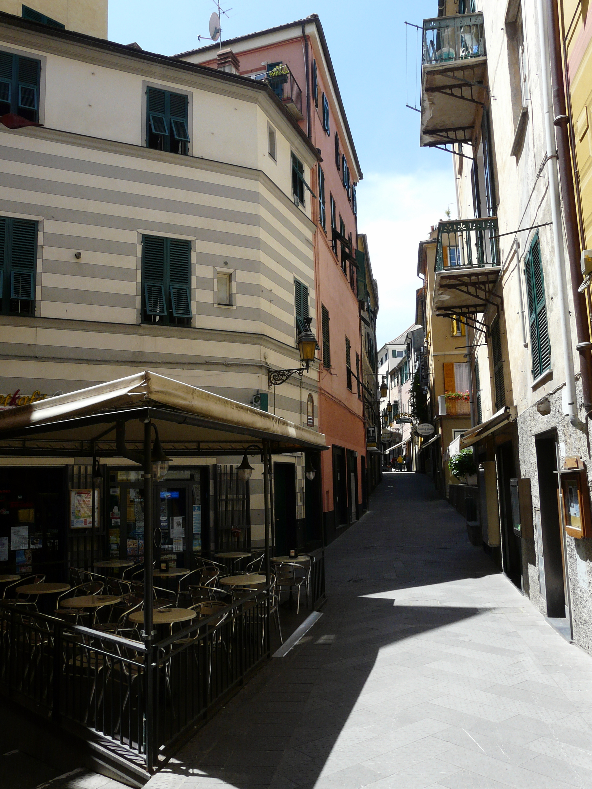 Centro storico di Arenzano, Liguria, Italia